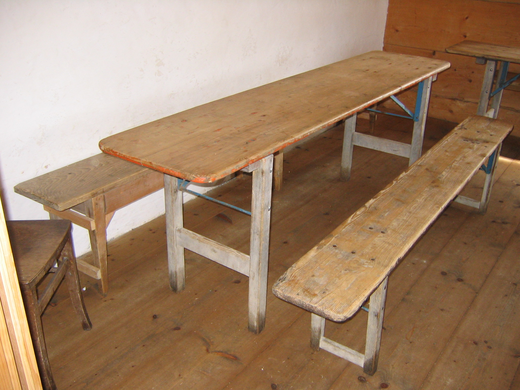 Alte Biergarnitur mit Holzbeinen im Freilichtmuseum Neuhausen ob Eck